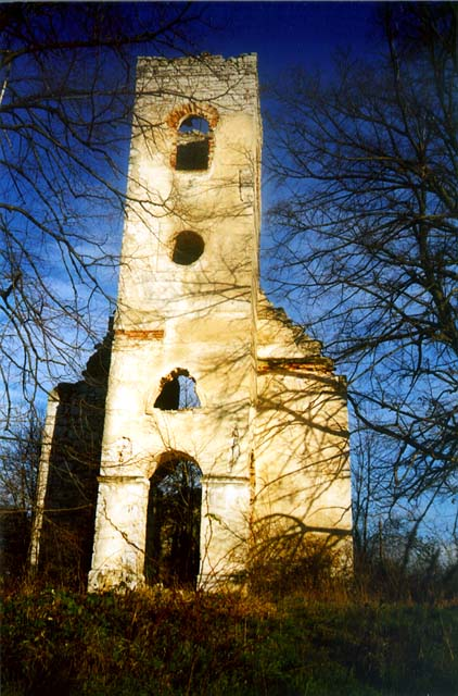 Црква Светог пророка Илије - Кордунски Љесковац коју су усташе запалиле 18.јула 1942. године